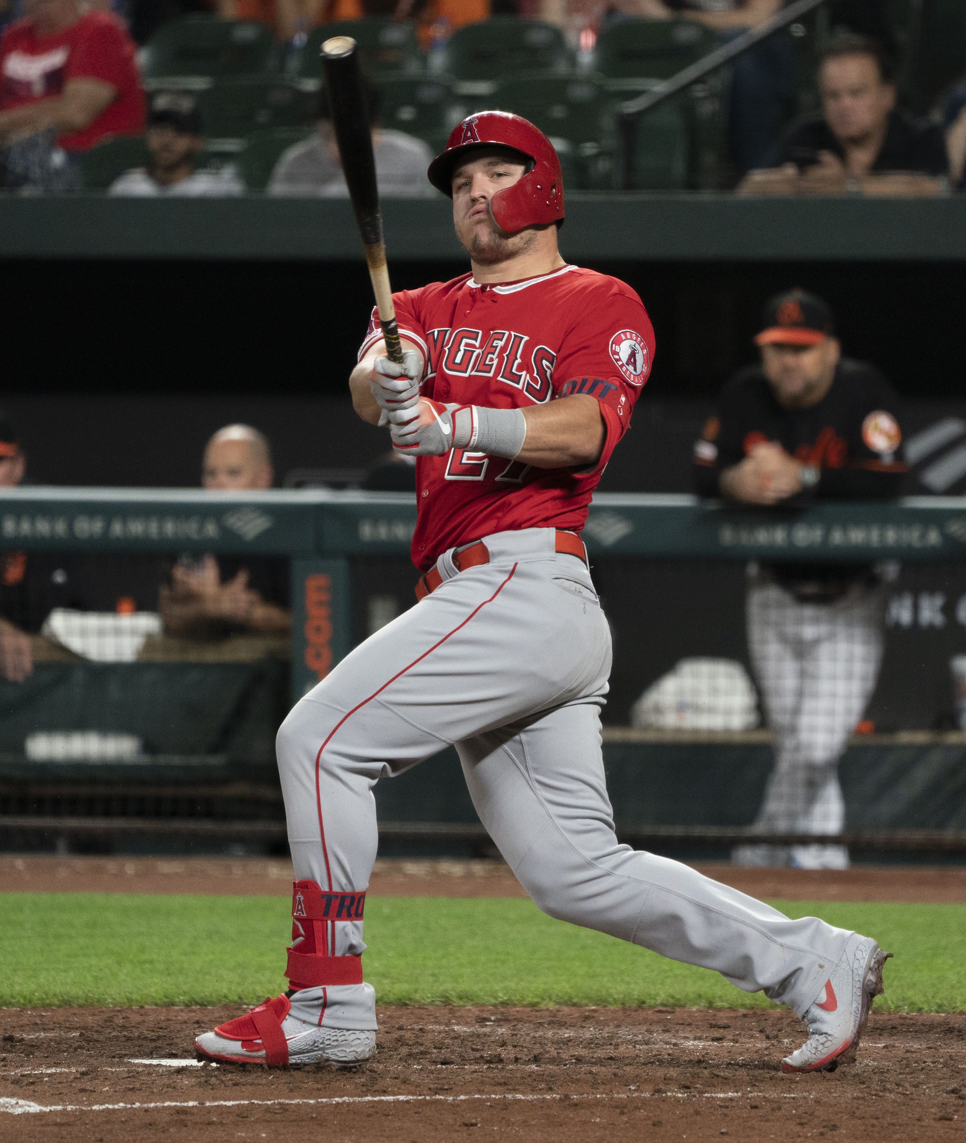 Angels at Orioles 5/10/19